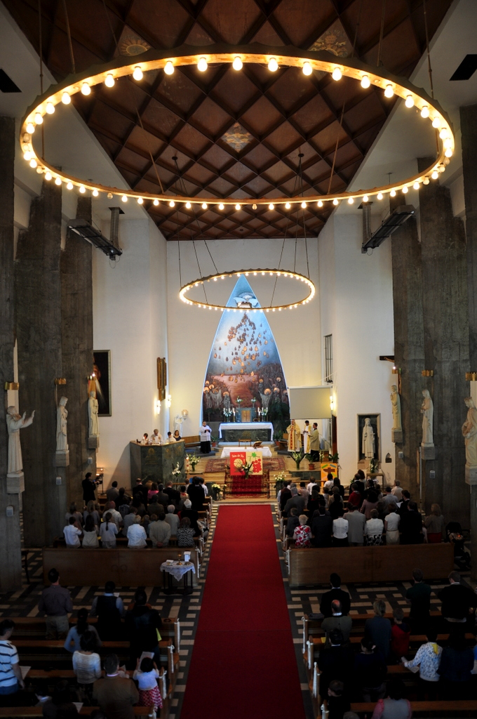 Holy Spirit church in Pesthidegkút, Budapest